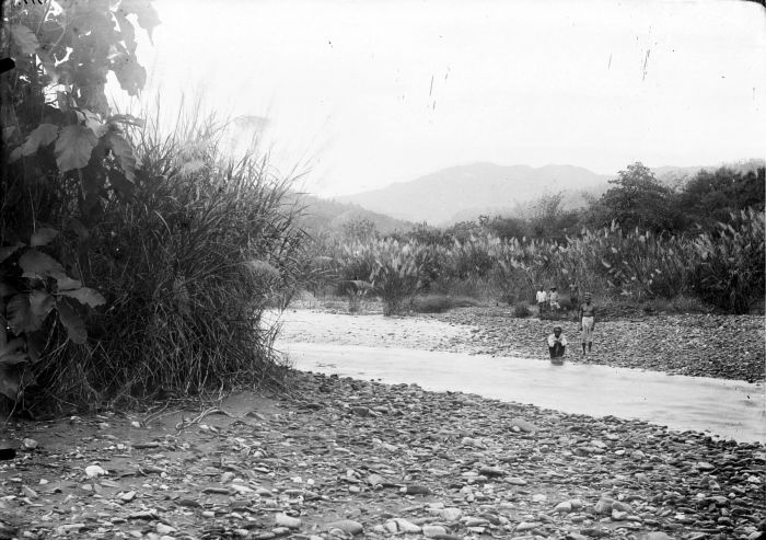 Negatief. Mannen uit Kajeli bij de bedding van de rivier Loemaiti op Boeroe